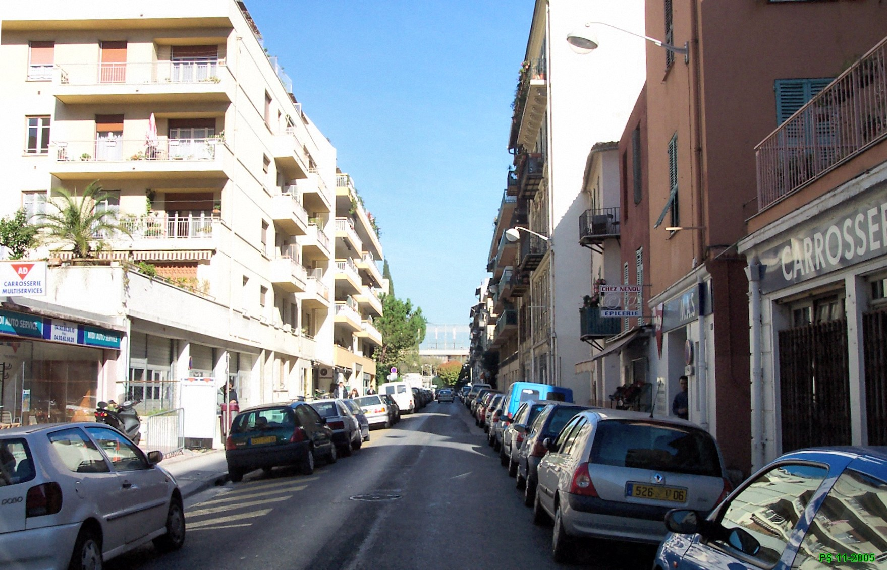 Avenue Pauliani. Direction N. Au fond, complexe Jean-Bouin (parking, piscine, terrains de sport in-door.